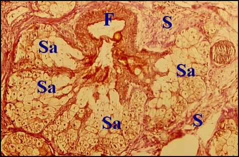 glandes sébacées hétérotopiques dans l'oreille moyenne.